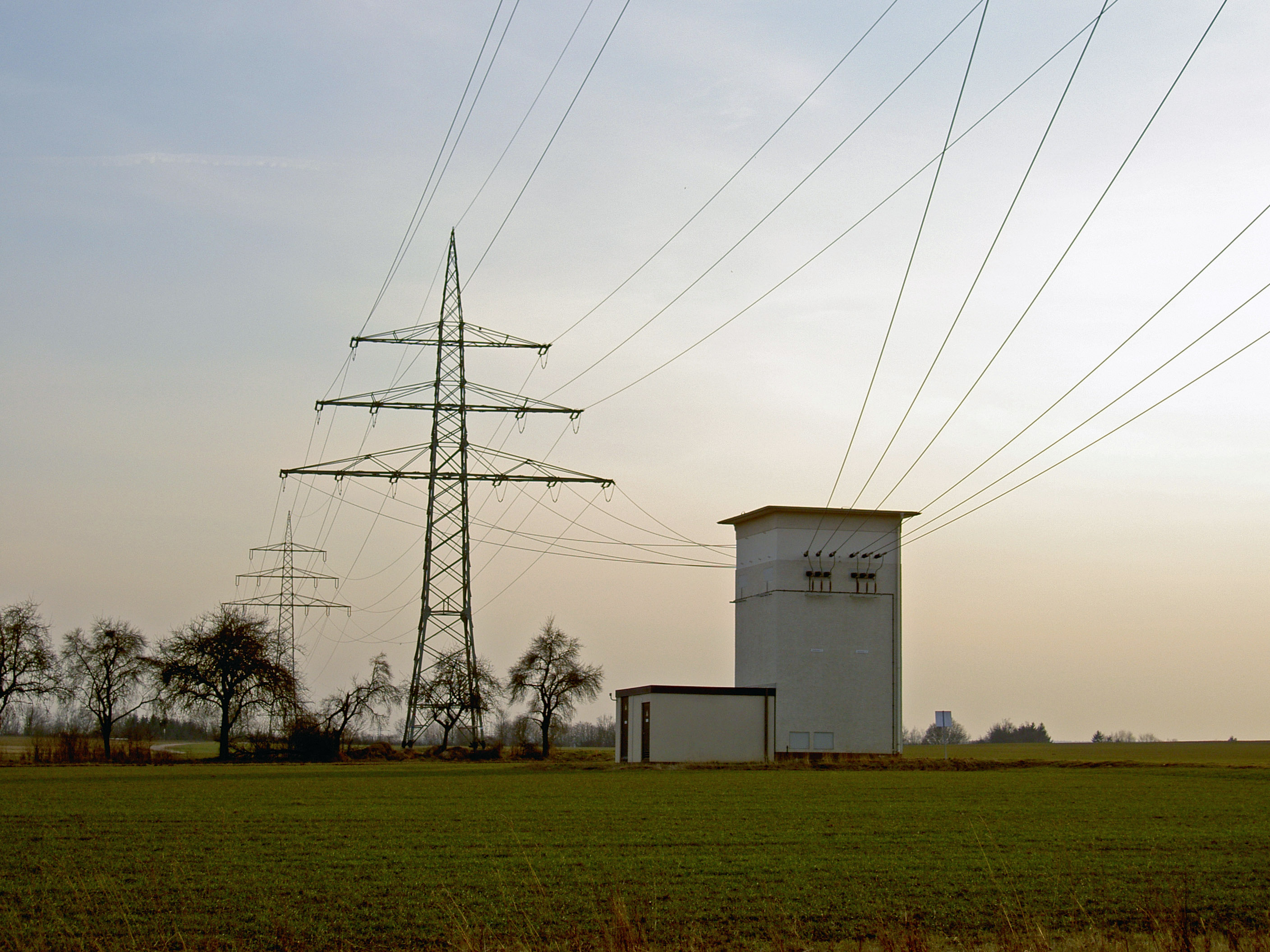 Energie Overhead powerline